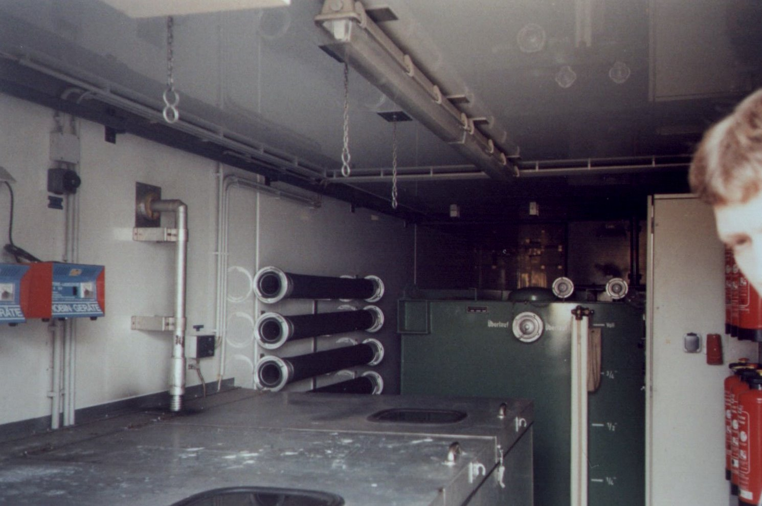 Tunnelrettungszug Schnellfahrstrecke Stuttgart Mannheim Im Innern des Löschmittelwagen des Tunnelrettungszug Schnellfahrstrecke Stuttgart Mannheim.